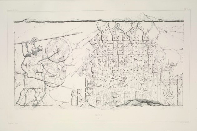 L'attaque de la cité mède de Kishshesim par l'armée assyrienne de Sargon II. Copie d'un bas-relief du palais de Dur-Sharrukin (Khorsabad) par Eugène Flandin, Monuments de Ninive (1849).